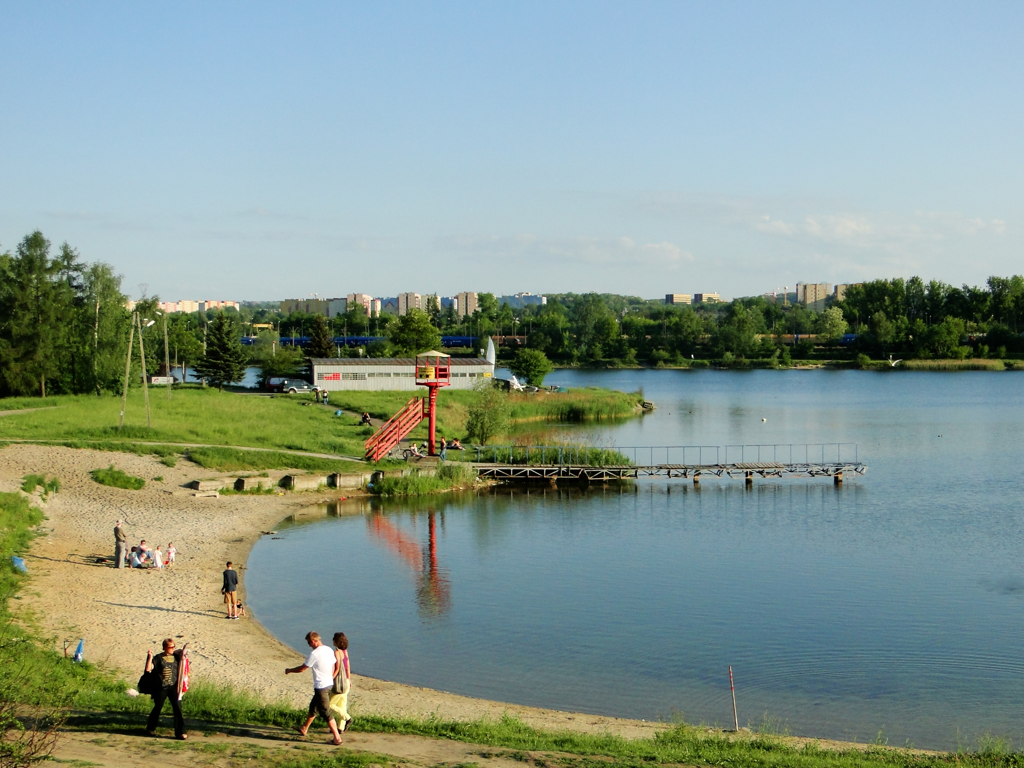 Widok krakowskich Bagrów.